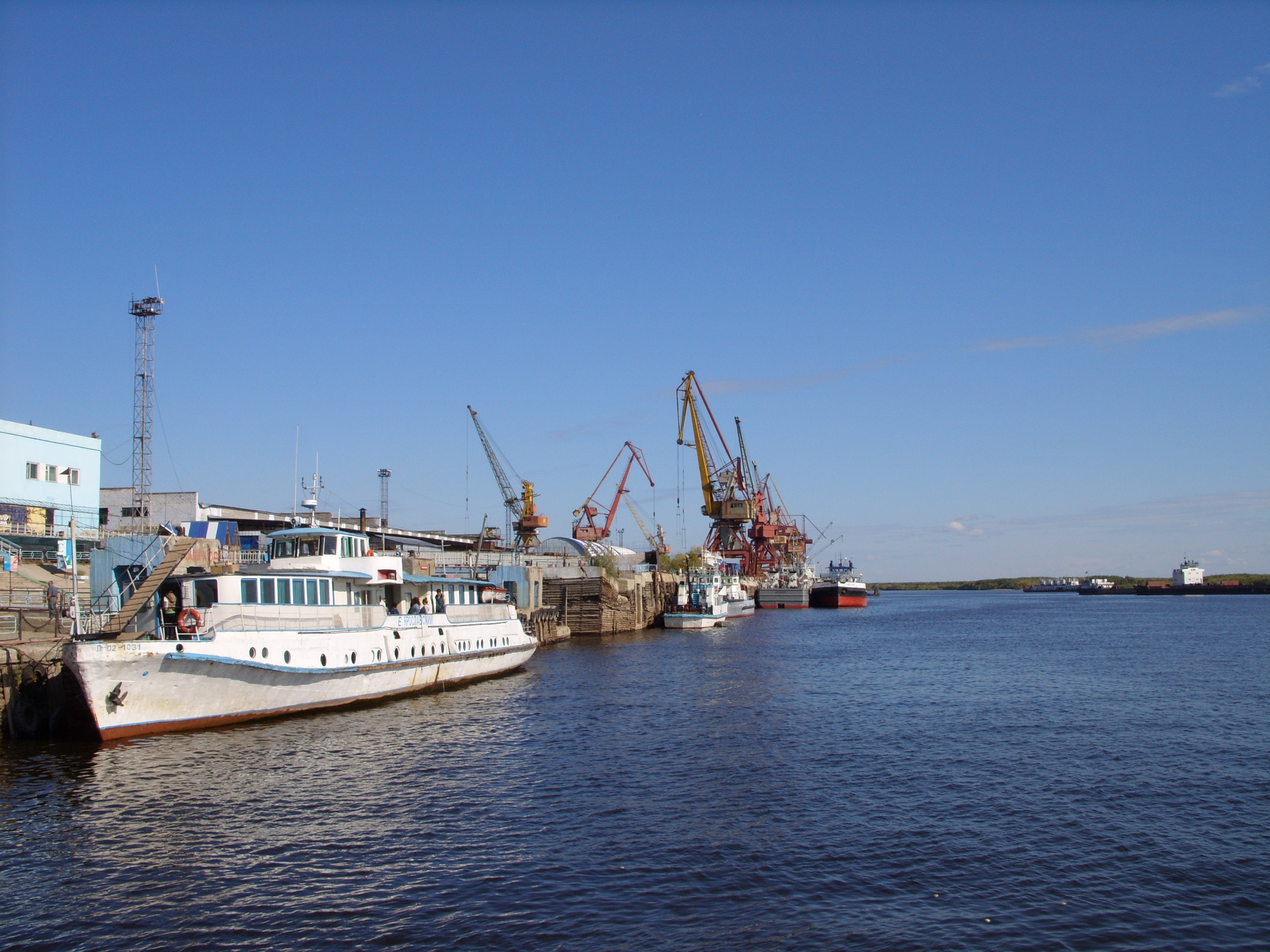 В Якутском речном порту, Снимок 2009 г.